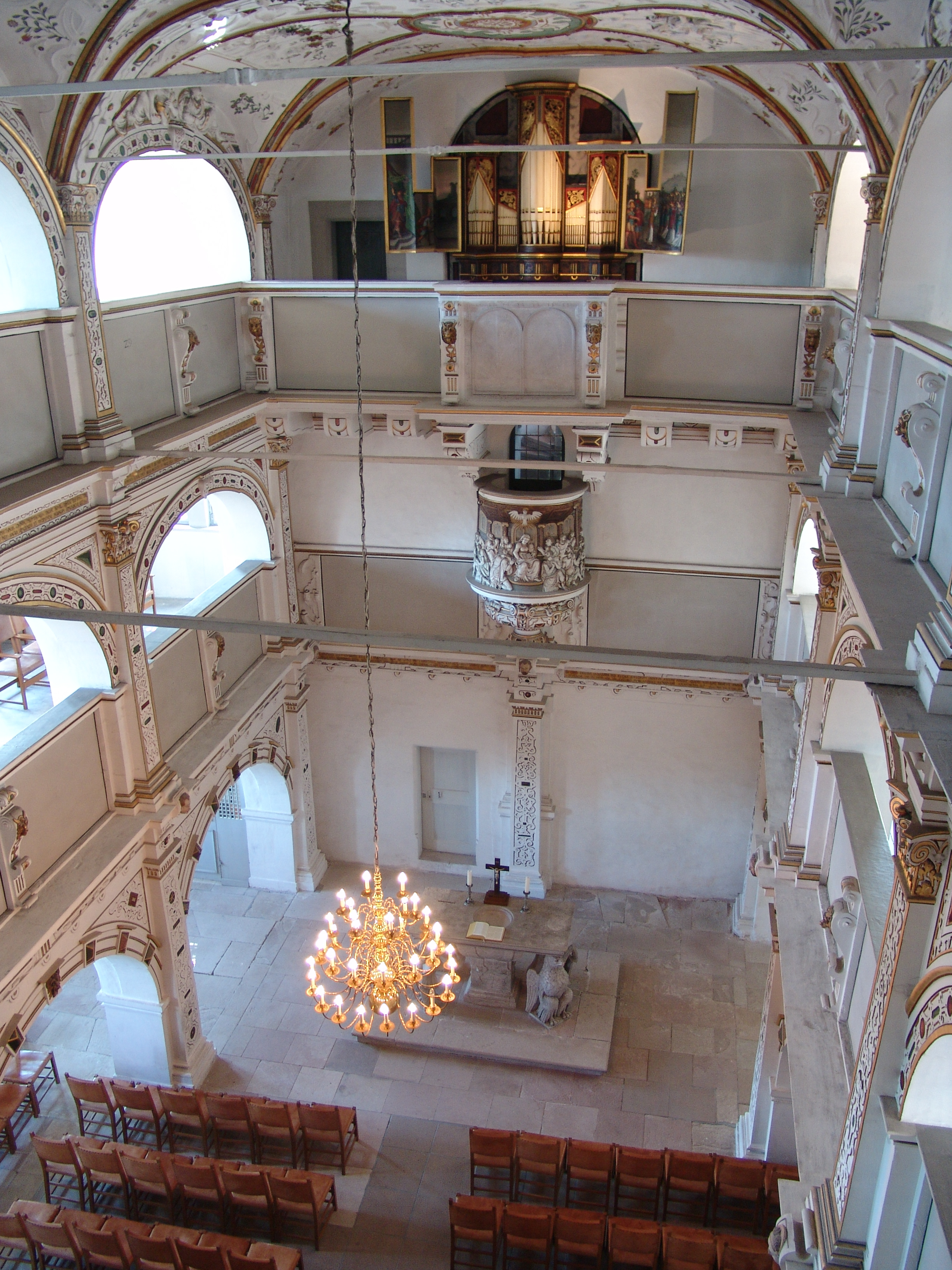 Schmalkalden, Schloßkirche